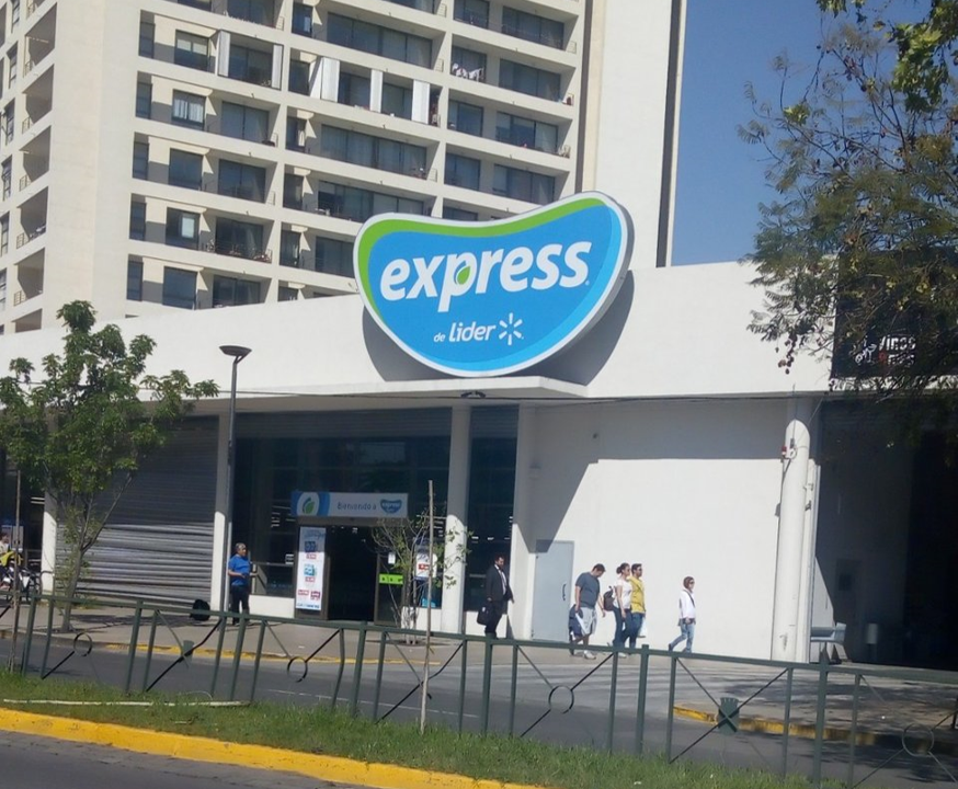 Frontis Express de Lider Ñuñoa